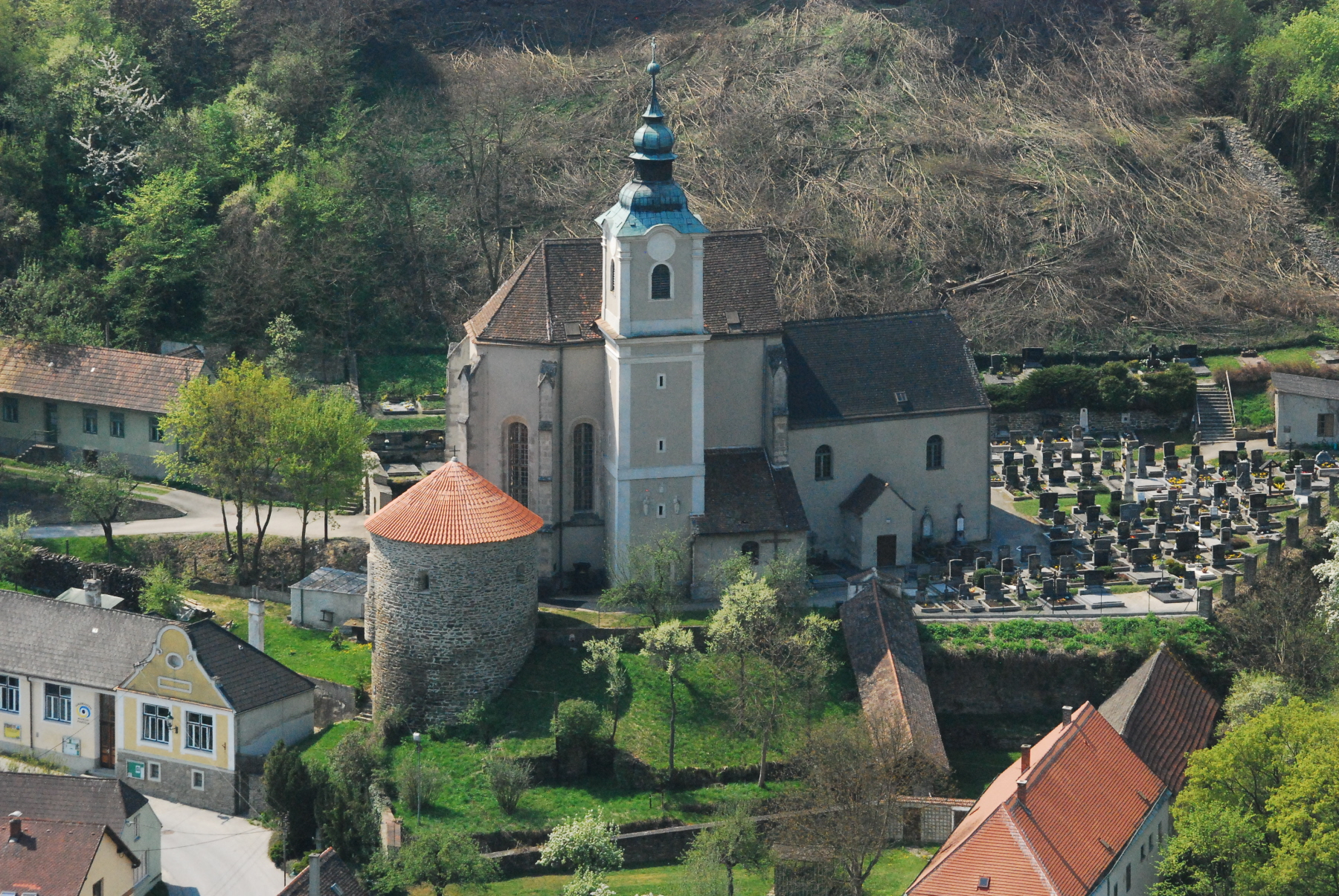 Die Kirche und der Karner von Hardegg von der Hardegger Warte in der Tschechischen Republik aus.